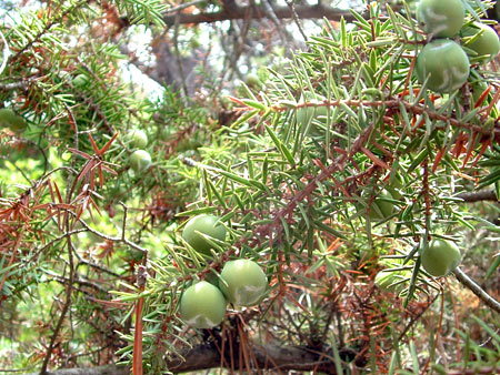 Ginepro Coccolone nella riserva Feniglia Foto di berlinerBlues 14:56, 27 ago 2006 (CEST)